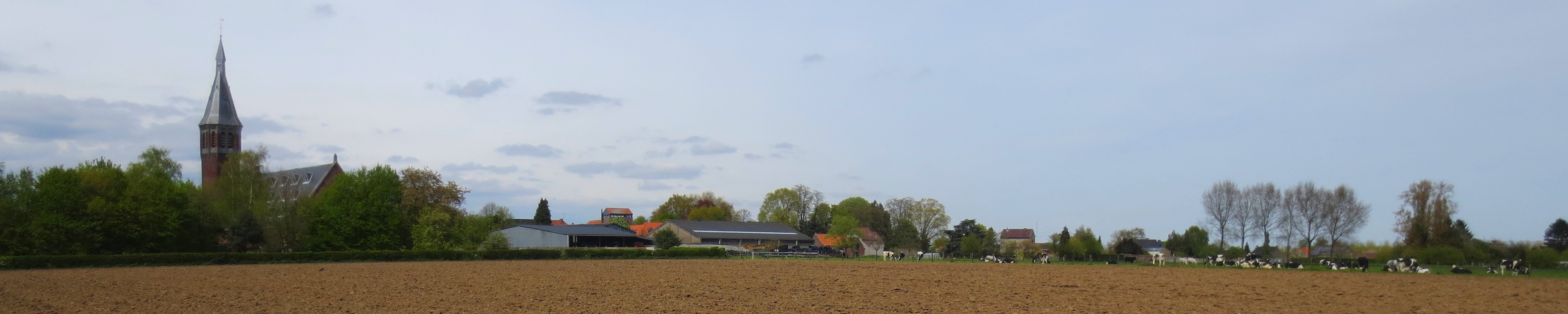 Bleharies